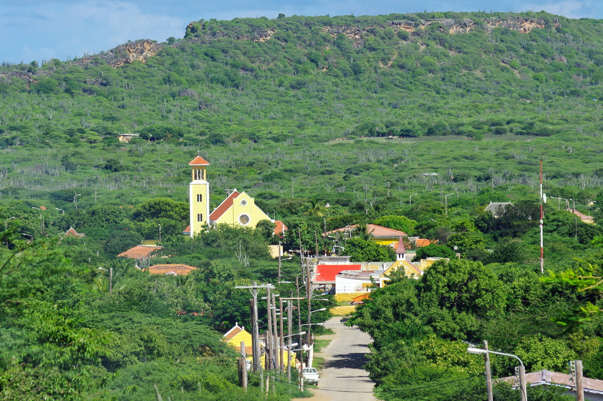 Bonaire, Blick zur Ortschaft Rincon